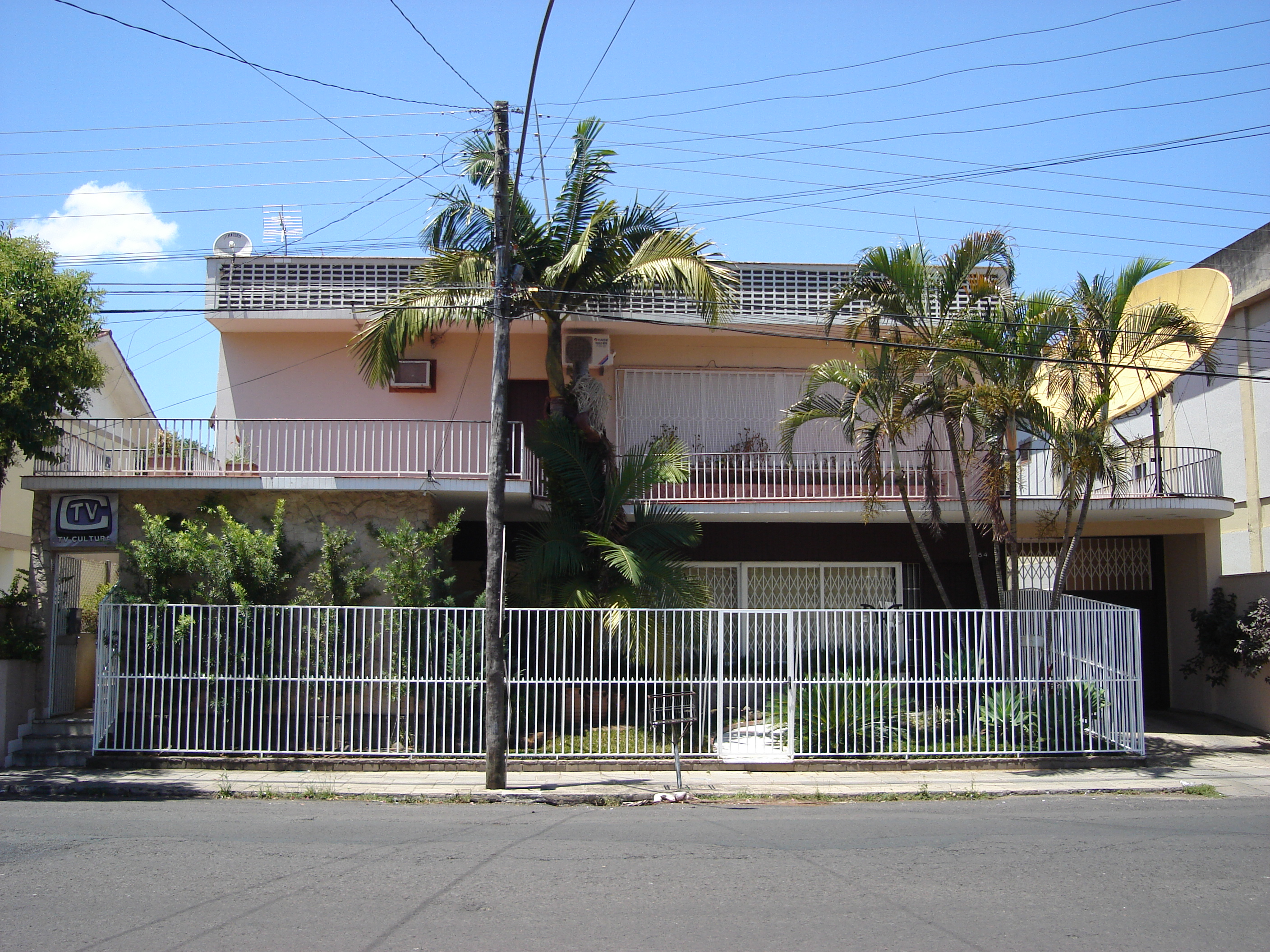 Sede da TV Cultura Montenegro.